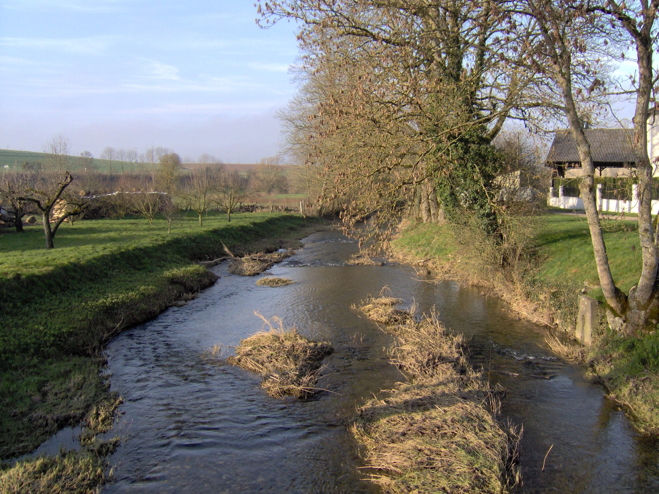 Vue de la rivière la Saulx à Ménil-sur-Saulx (France,55). Photo prise le 28 décembre en matinée.